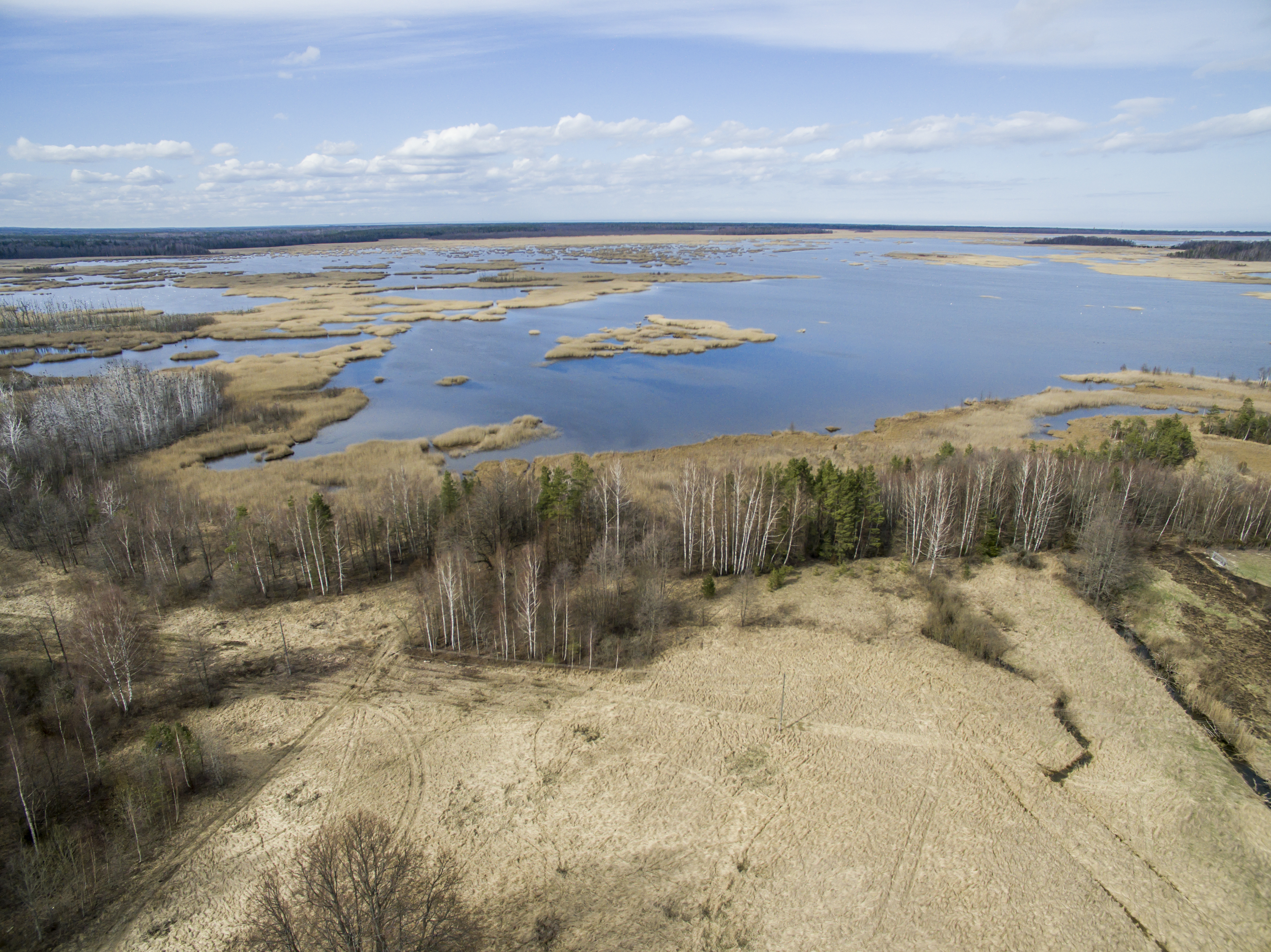 Lapmežciems Parish, Latvia